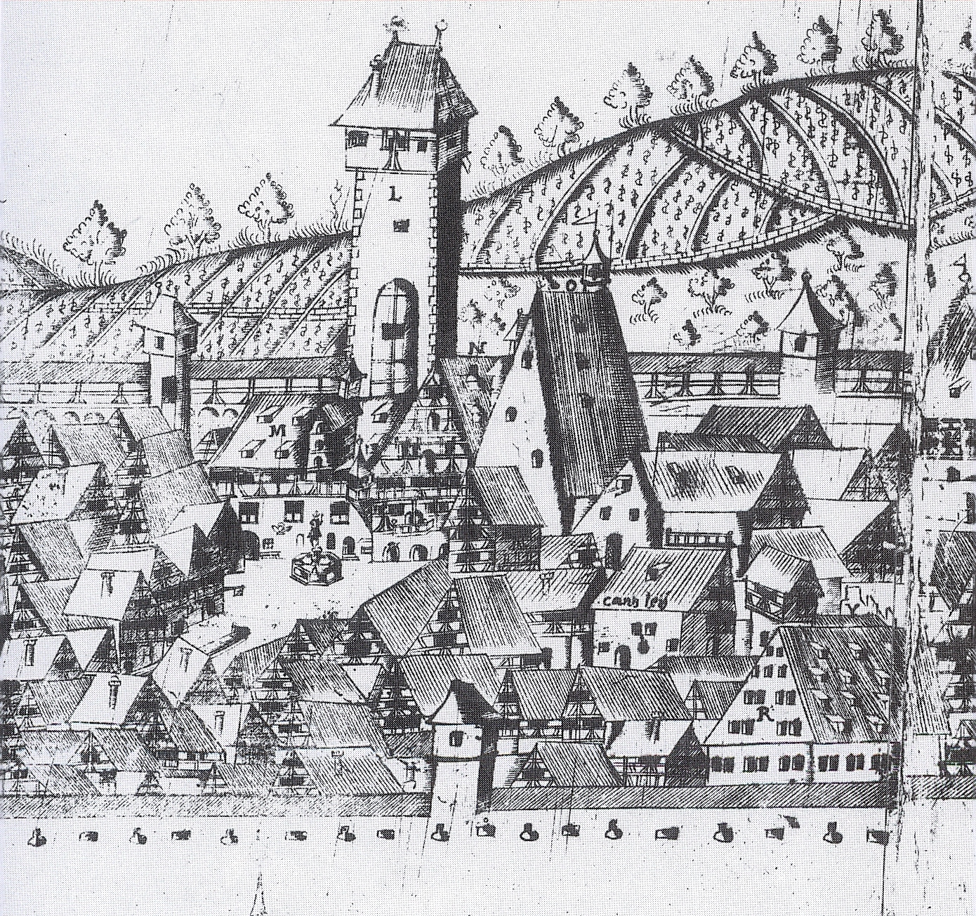 Viertel der Kaufleute und Bänker, Marktplatz mit den wenigen frühmittelalterlichen Steinhäusern: Rathaus, rechts davon "Bürgerhaus" (mit steilem Giebel und Glockentürmchen auf dem Dachfirst), "Kanzleigebäude", "Königsbronner Klosterhof" mit zinnenartigem Giebel und turmähnlichen Gebäude.